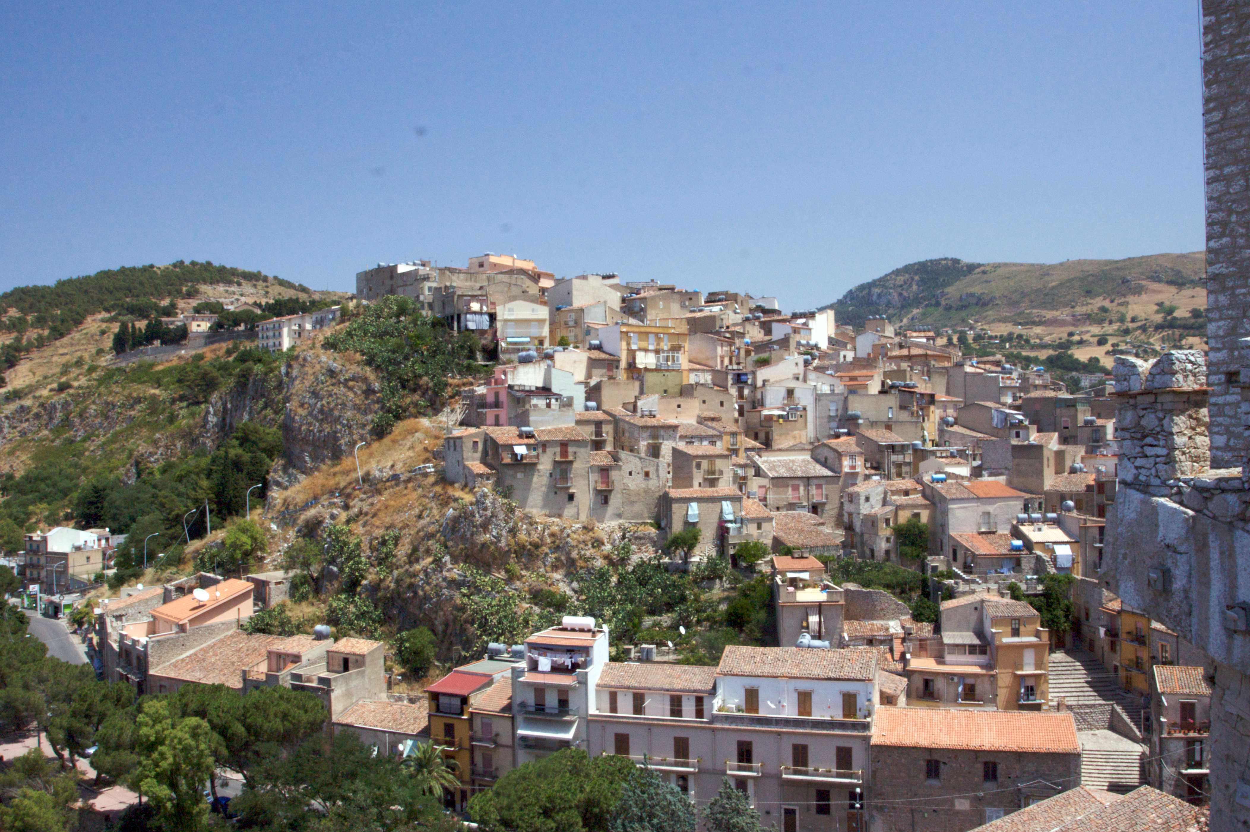 Caccamo in Palermo province